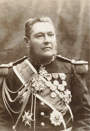 L'amiral Amédée Bienaimé (Album de 510 célébrités contemporaines - 2ème collection Félix Potin)